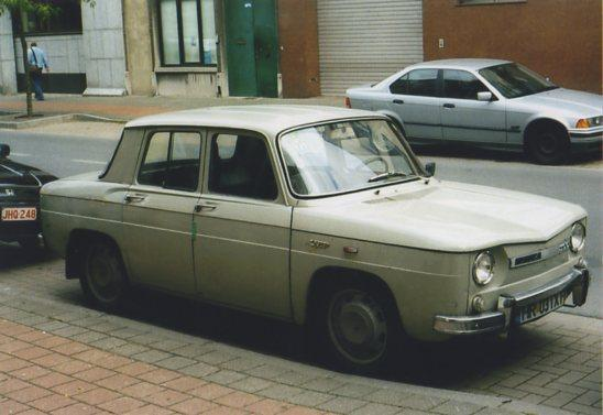 Dacia 1100 roumaine photographiée à Bruxelles (Belgique).